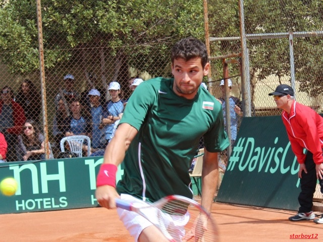 Григор Димитров на плейофа за оставане на втора Евро-африканска група купа Дейвис през 2014